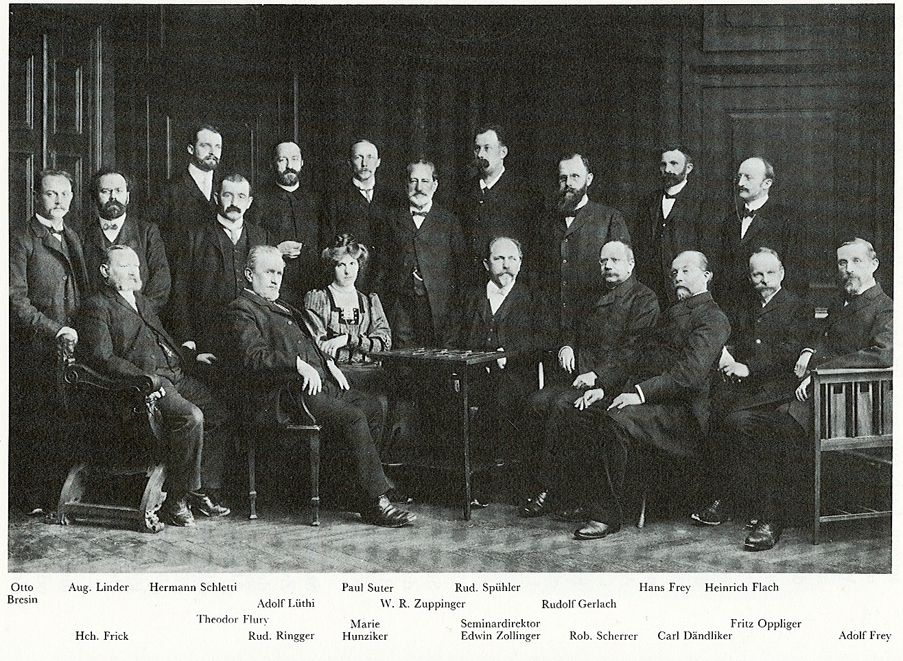 Seminar Küsnacht: Lehrerschaft 1907